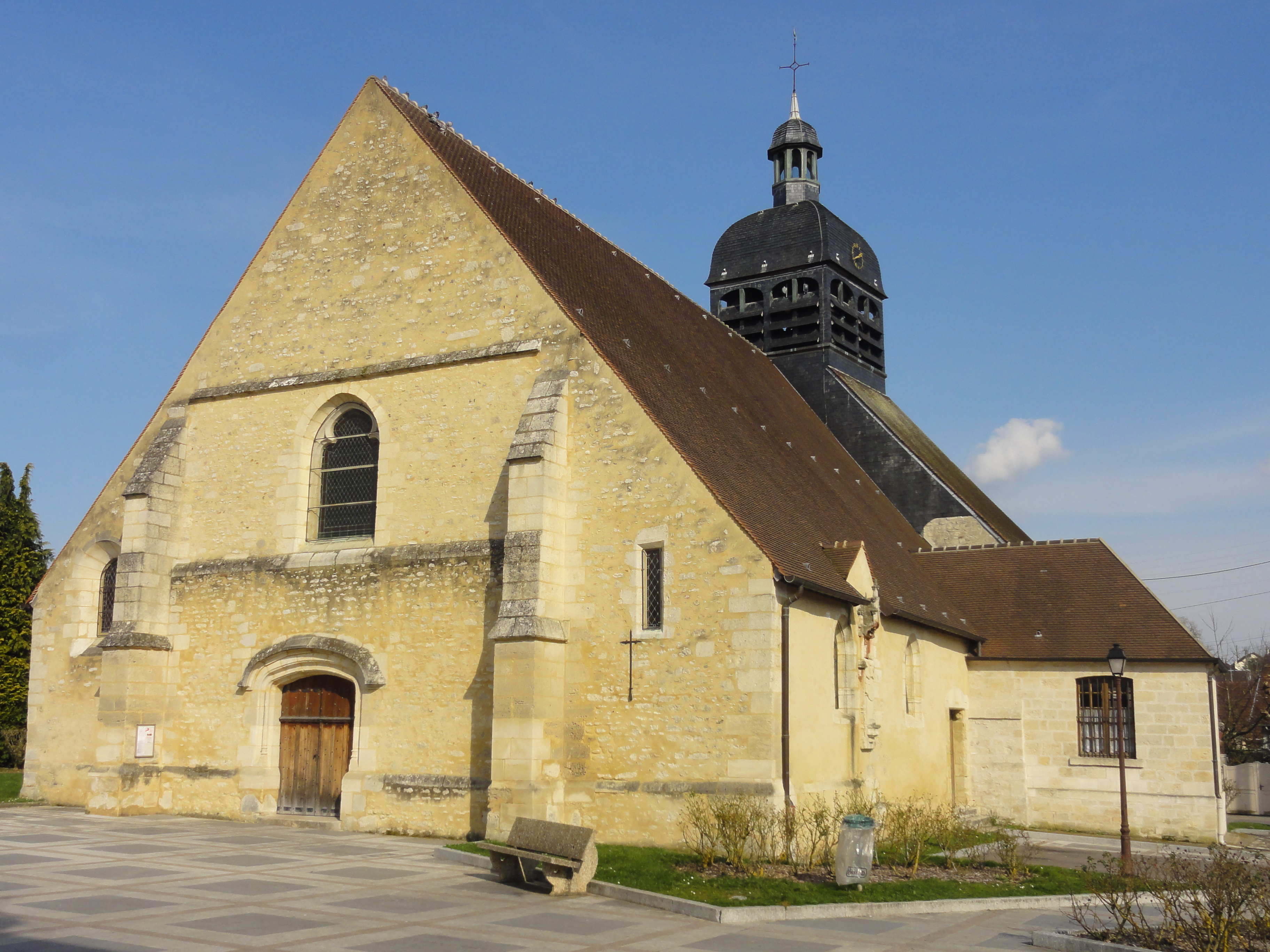 Église Saint-Denis de Bornel - voir titre.